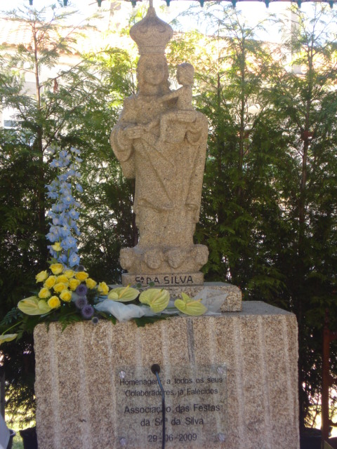 Senhora da Silva em Pedra